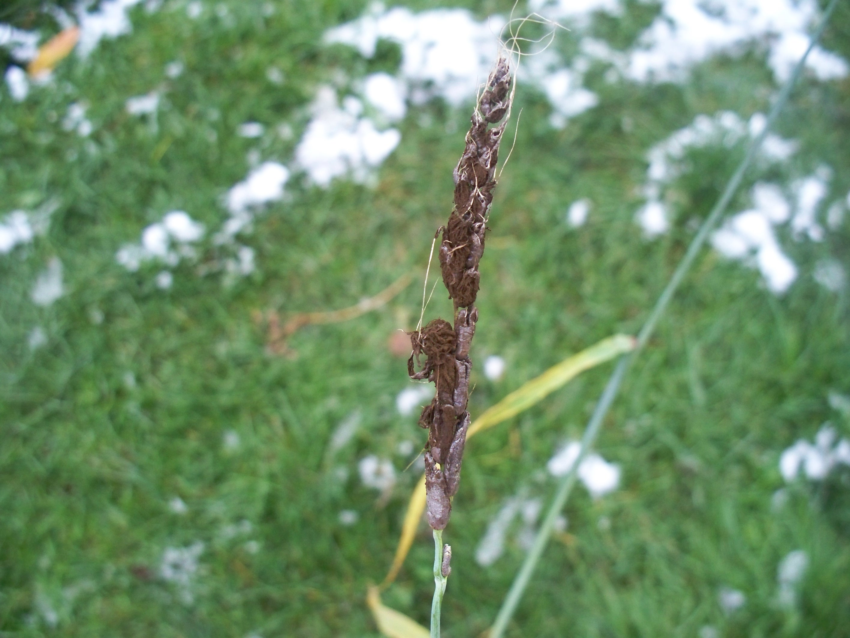 Głownia pyląca na jęczmieniu jarym